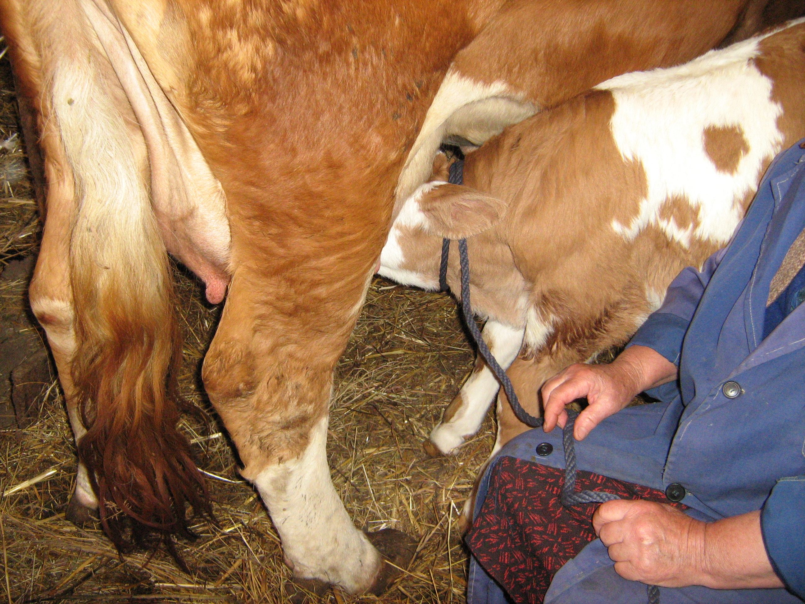 Dojenje teleta u Šaranima.